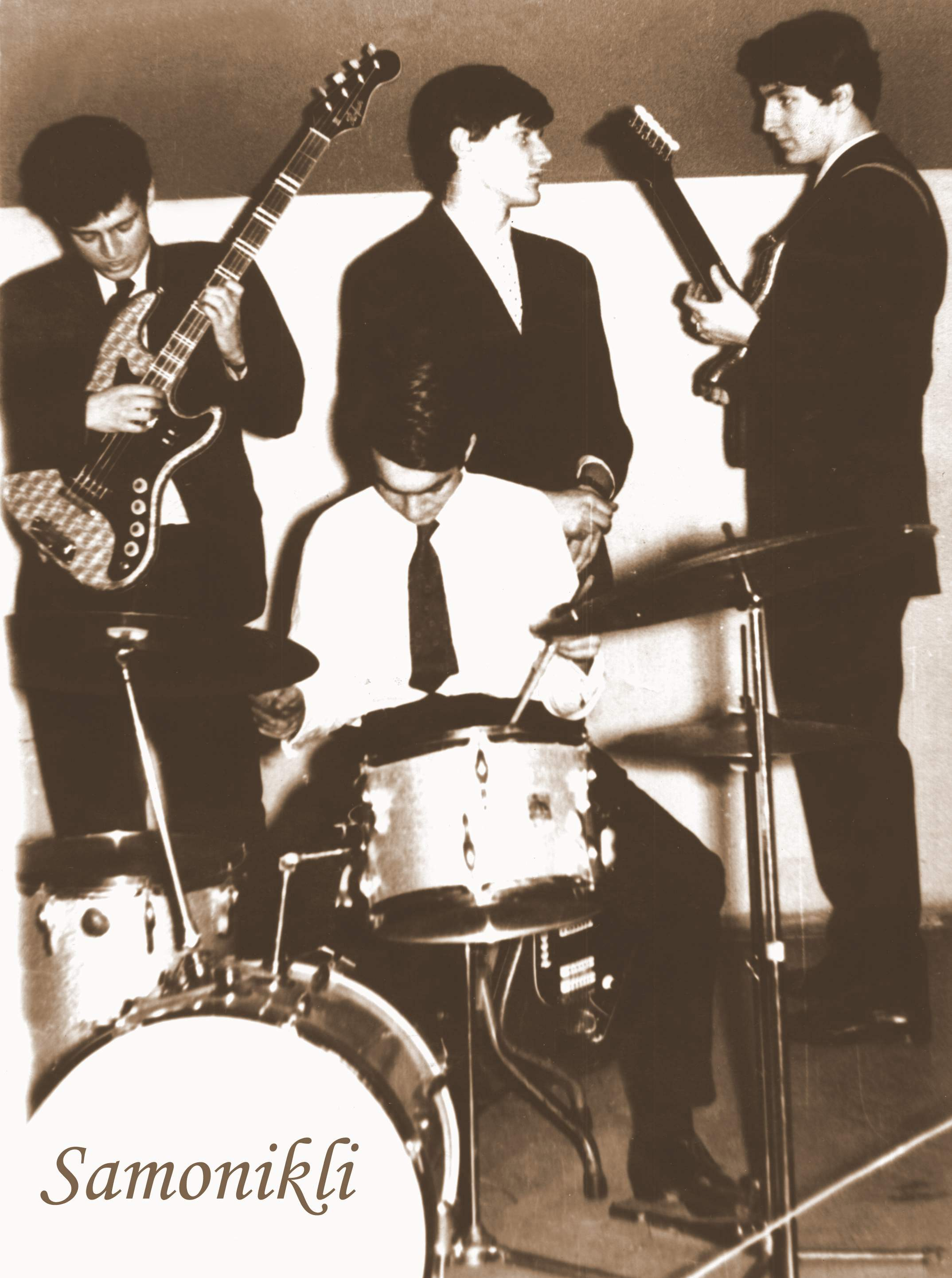 Samonikli rock band